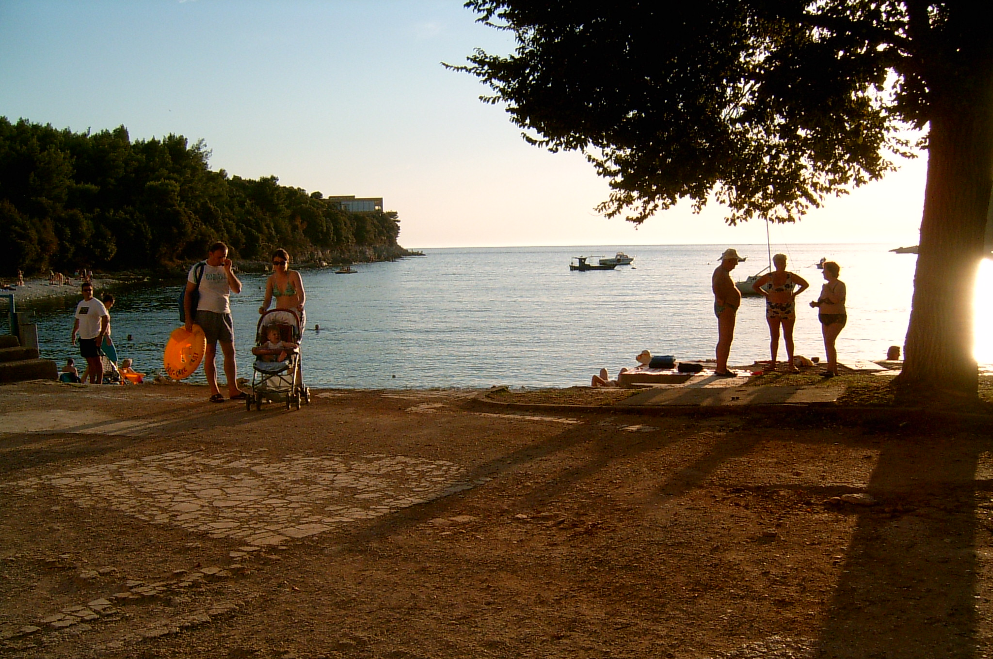 Chorwacja, Pula